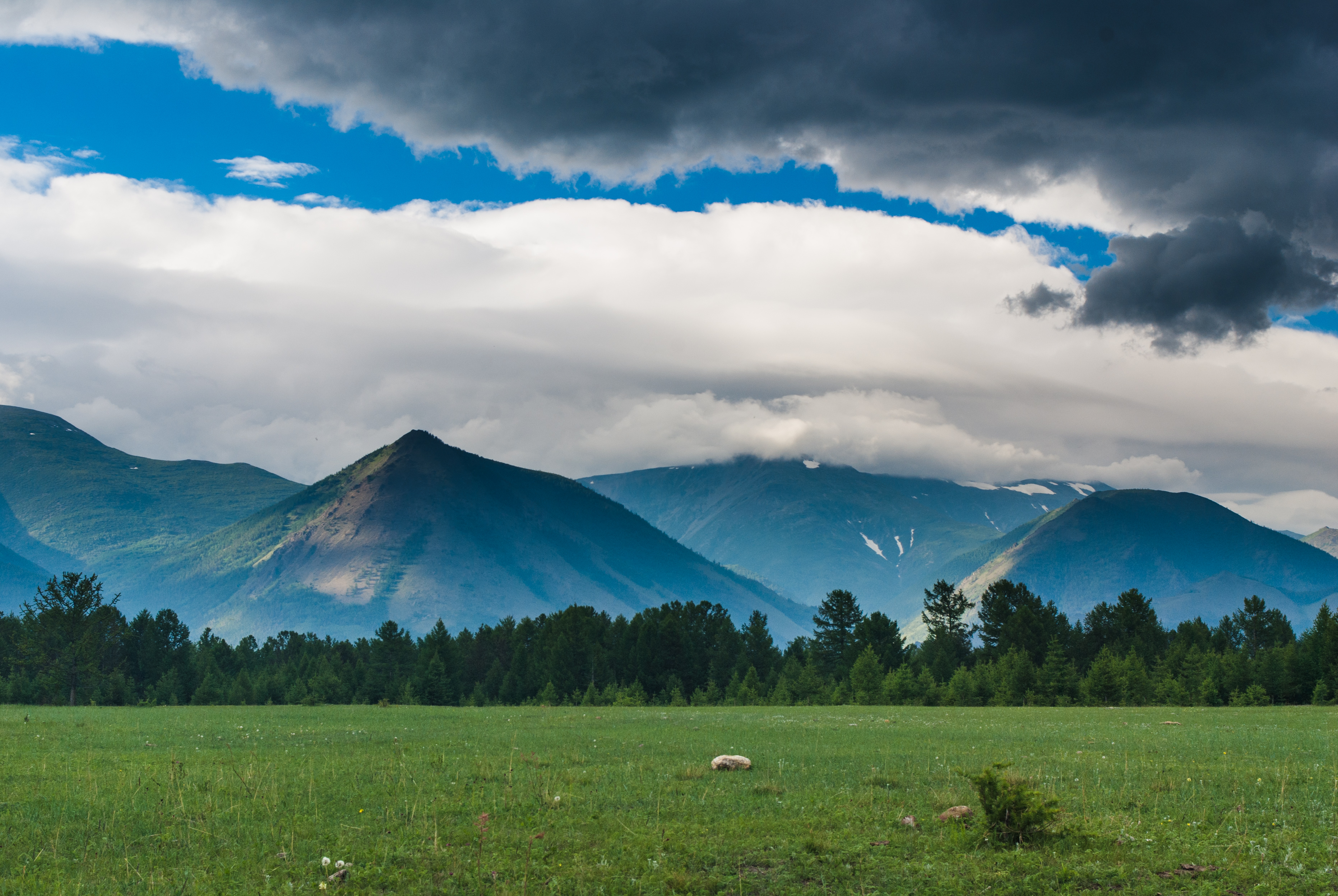 Онгурены-Кочерикова: Ольхонский район, Иркутская область This image is related to the protected area of Russia number 3810283